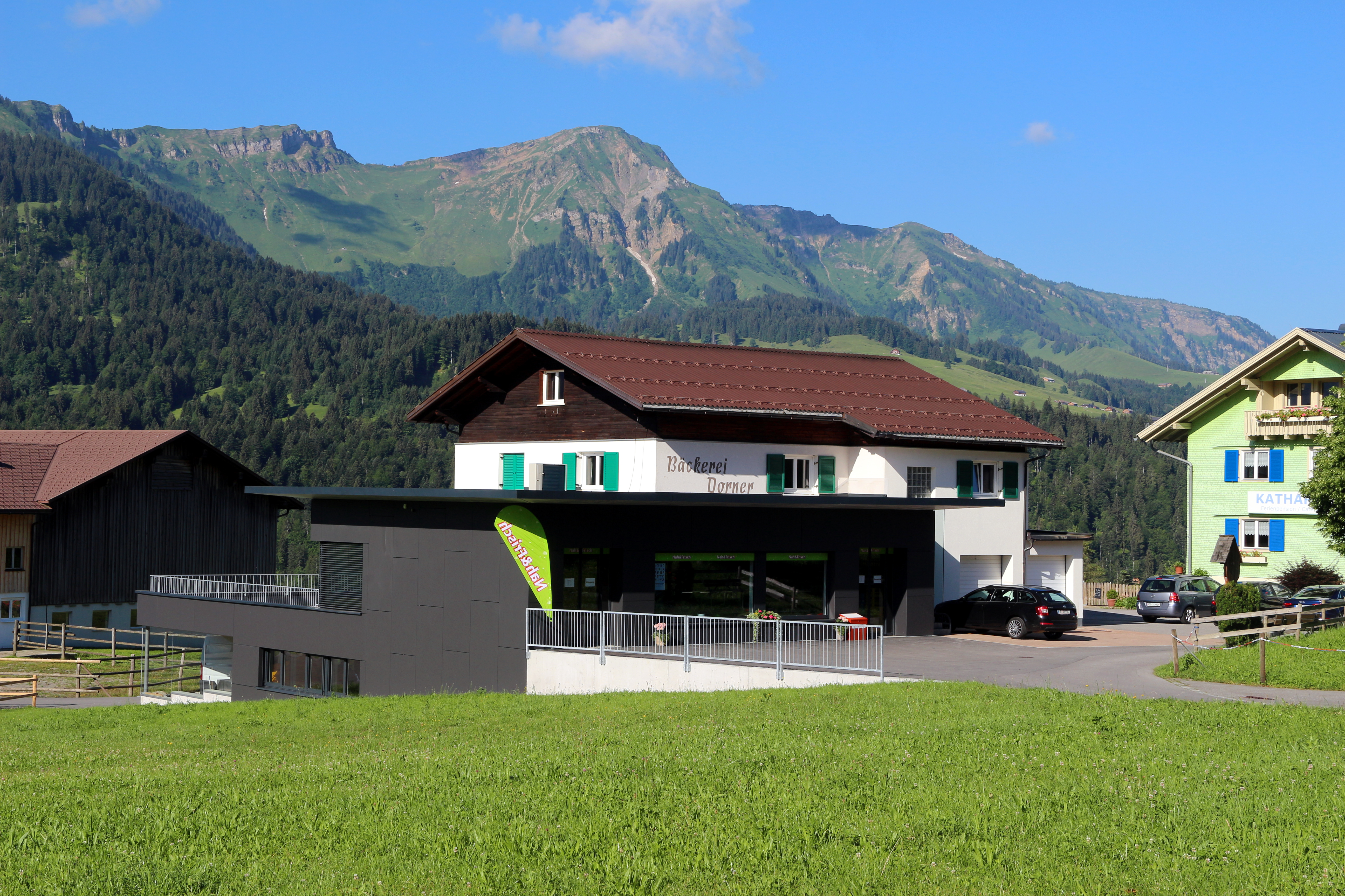 Nah&Frisch in Sibratsgfäll, Vorarlberg.